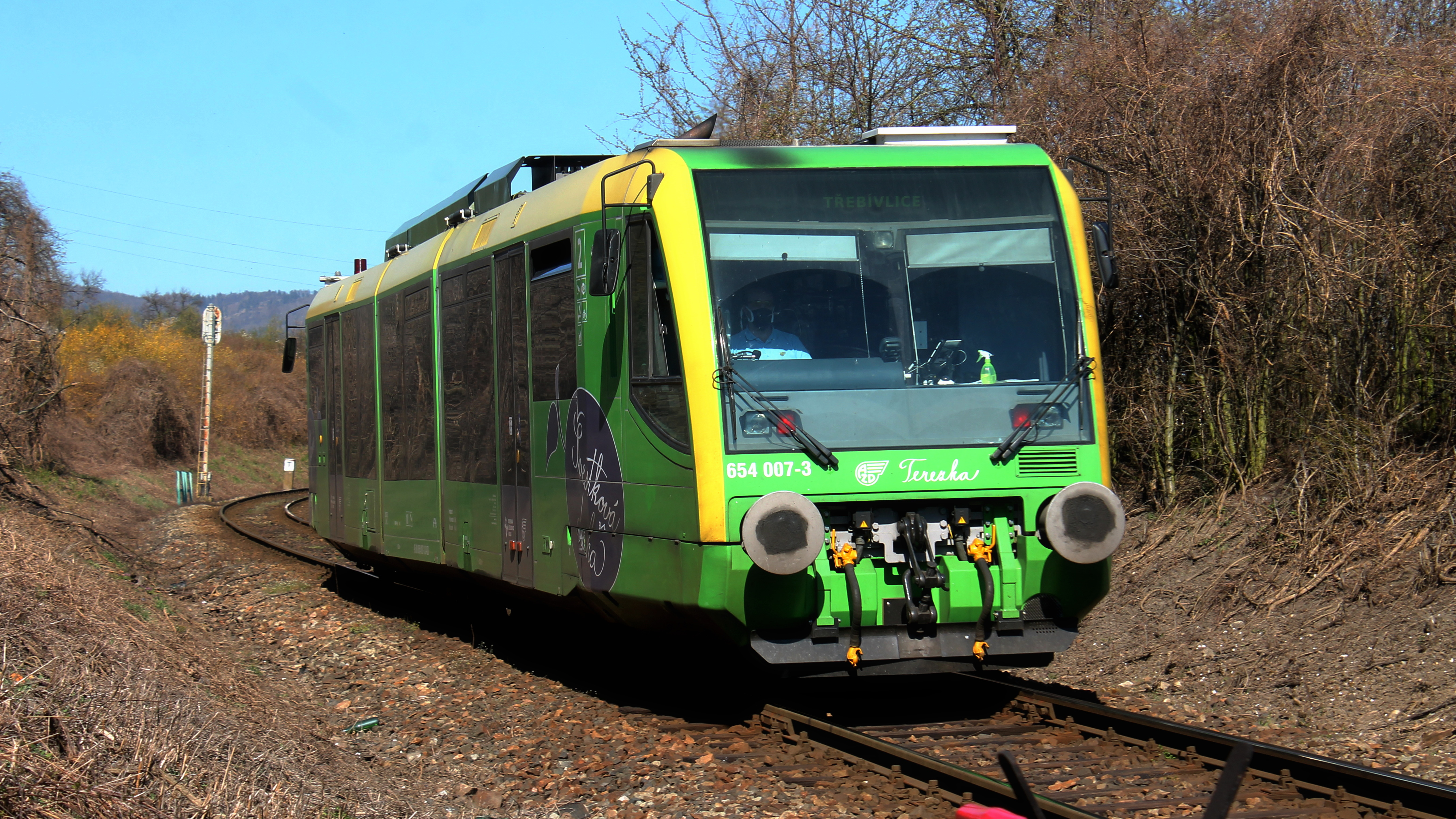 Motorová jednotka 654.007-3 "Terezka" v litoměřickém záhlaví žst. Žalhostice